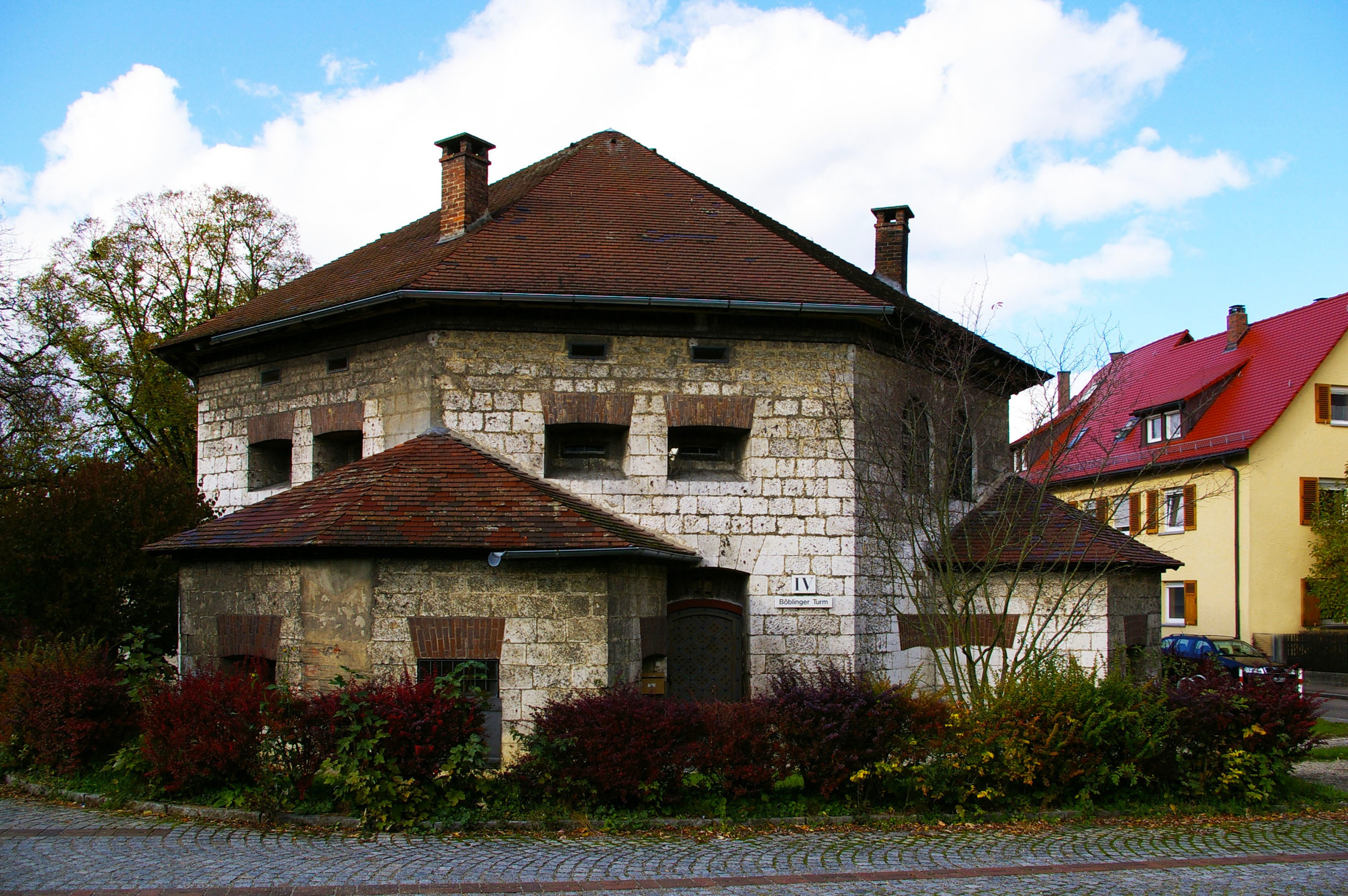 Böblinger Turm, Teil der Mittelbastion der Bundesfestung Ulm